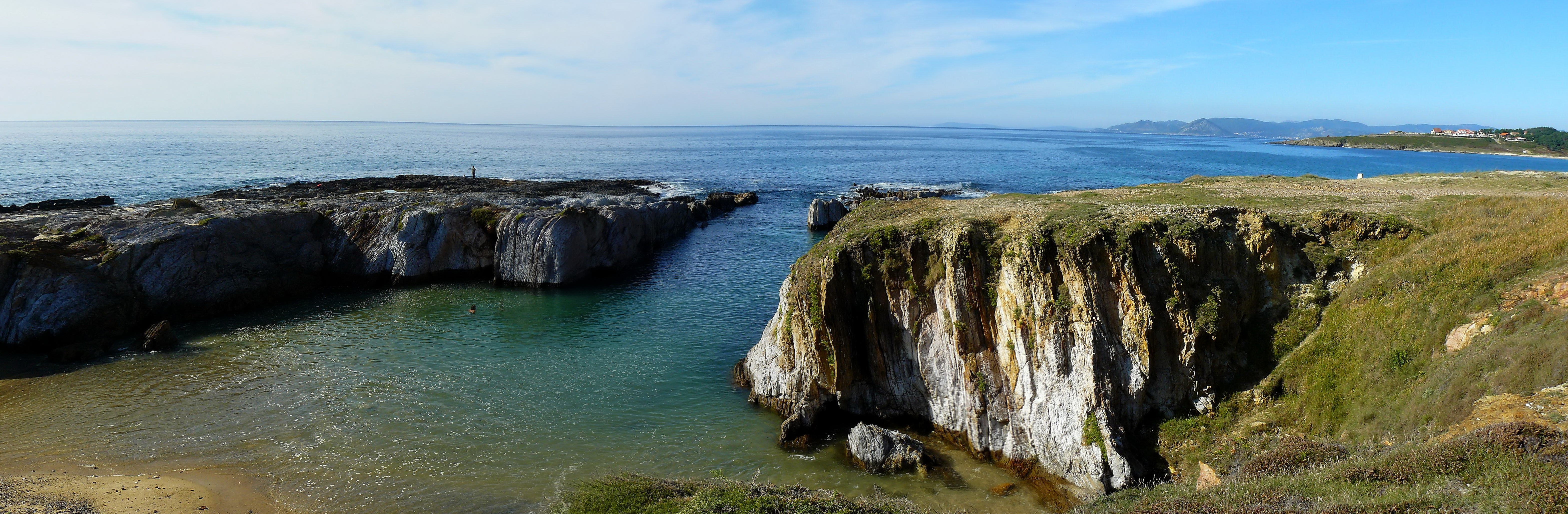 Parte da Praia das Furnas na parroquia de Xuño, concello de Porto do Son